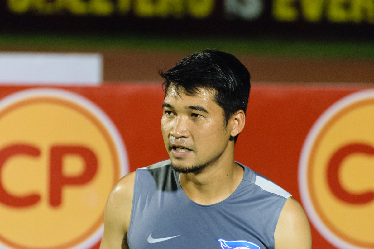 Napat Thamrongsupakorn